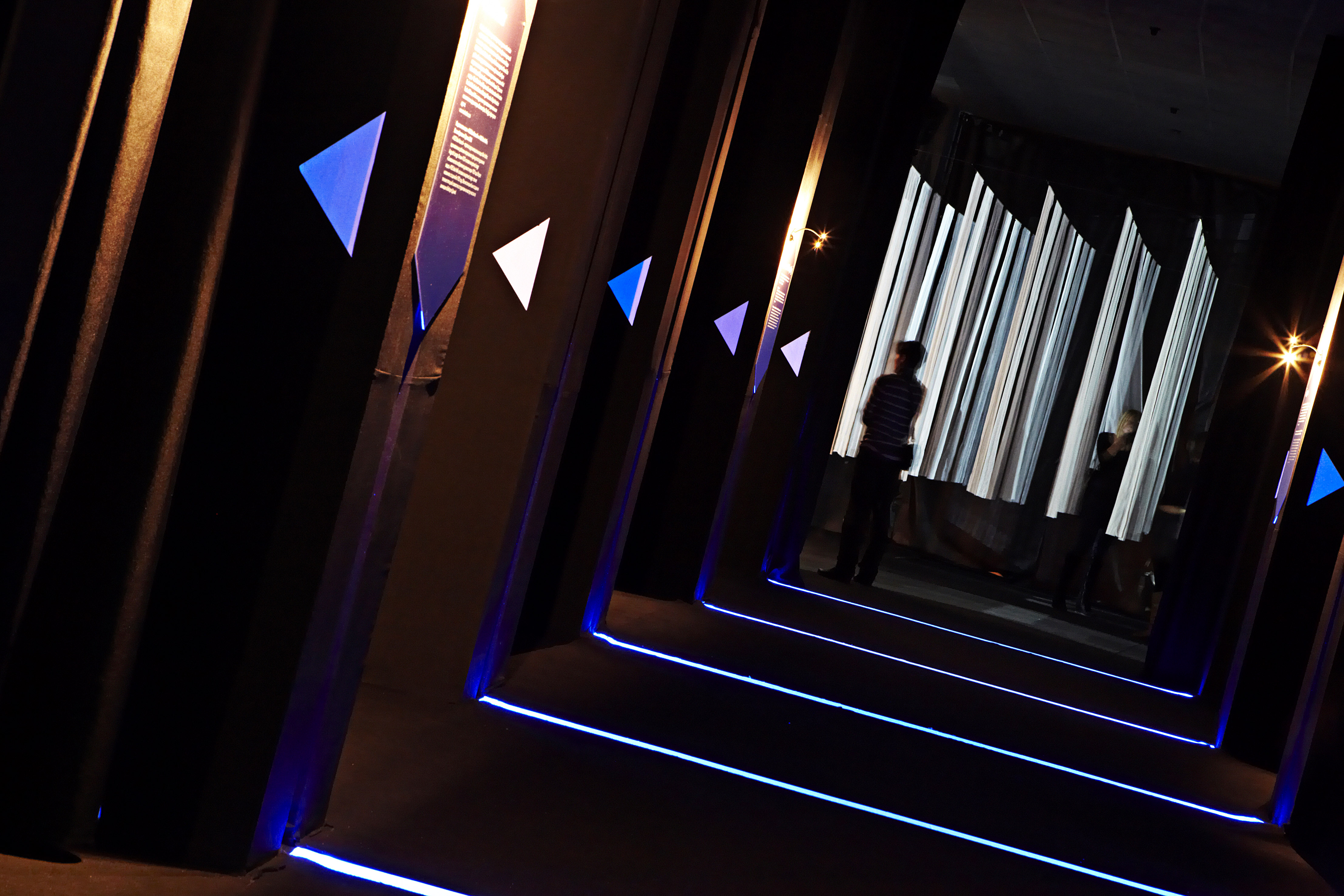 Фестиваль Yota Space 2010 - зона onedotzero